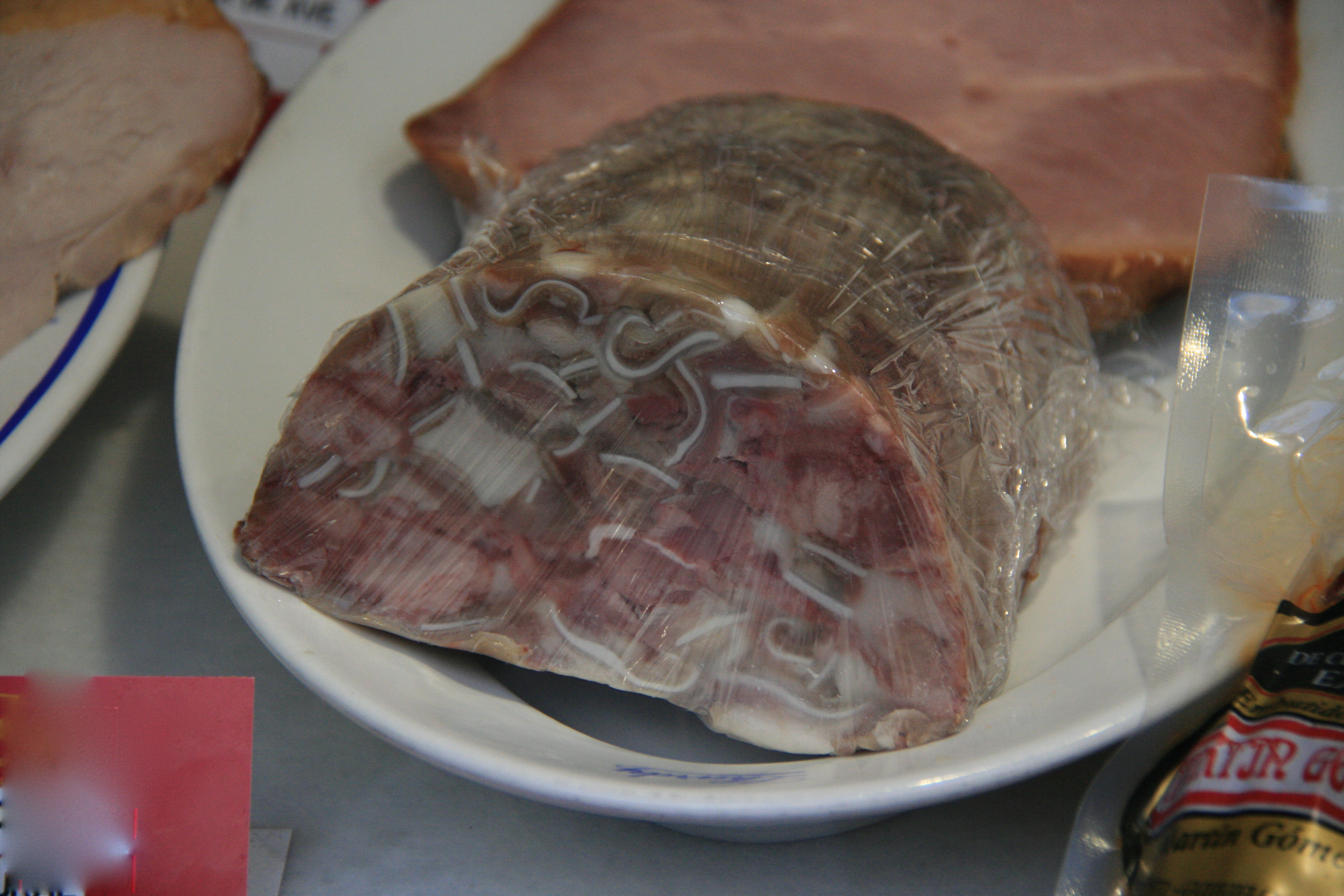 Embutido de chicharros - España